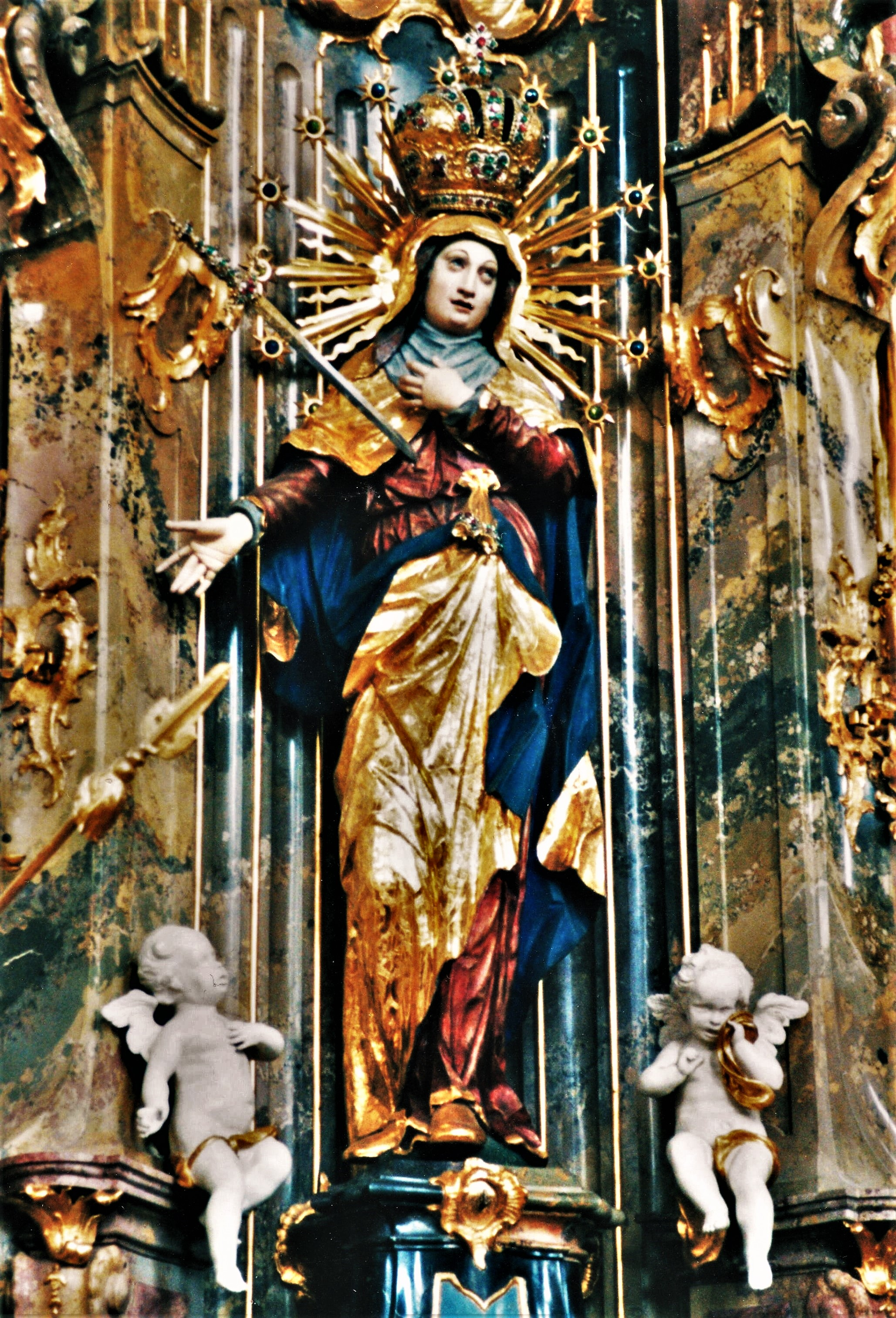 Wallfahrtskirche Maria Steinbach, Schmerzhafte Muttergottes (um 1622)